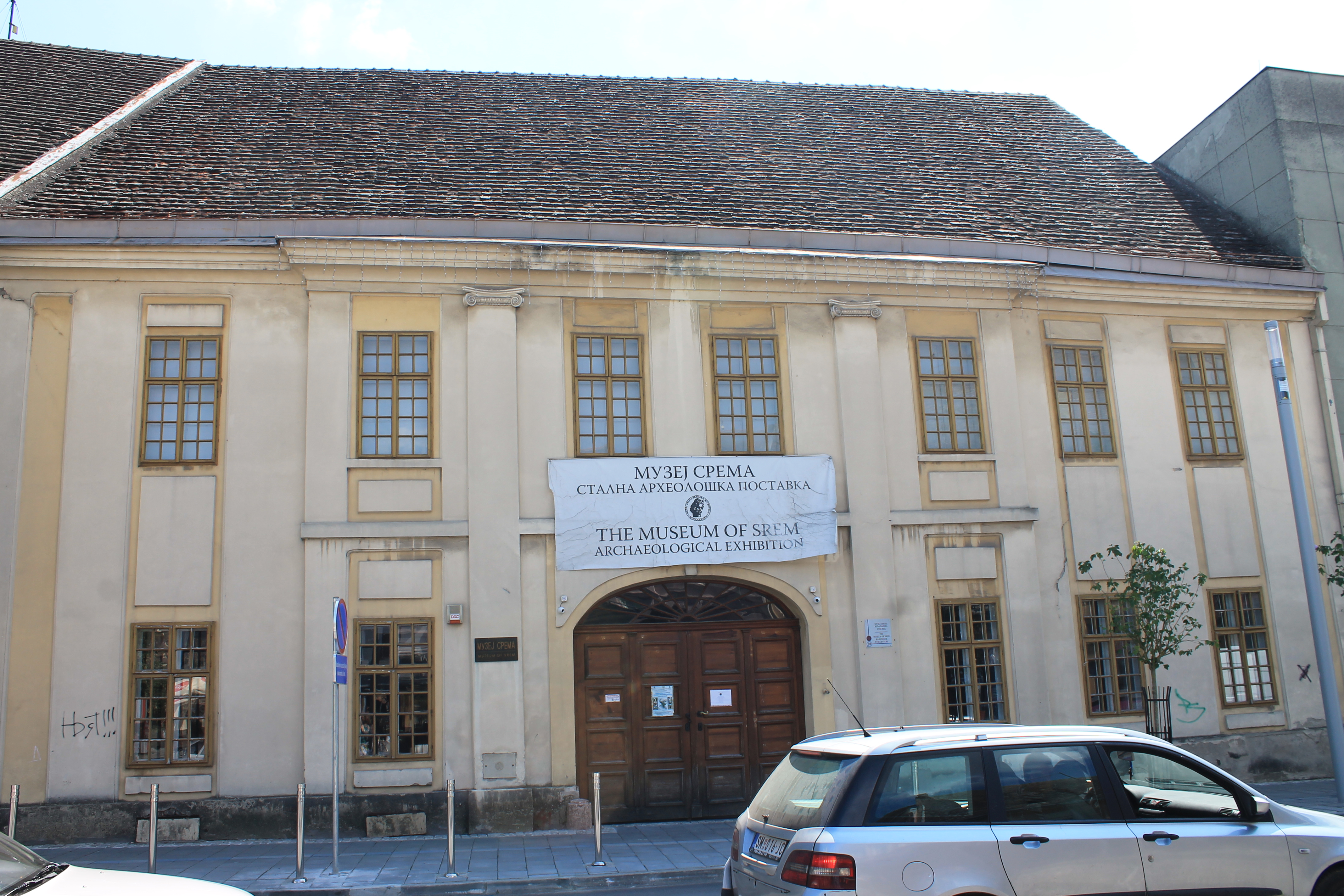 Lipidarijum, Sremska Mitrovica